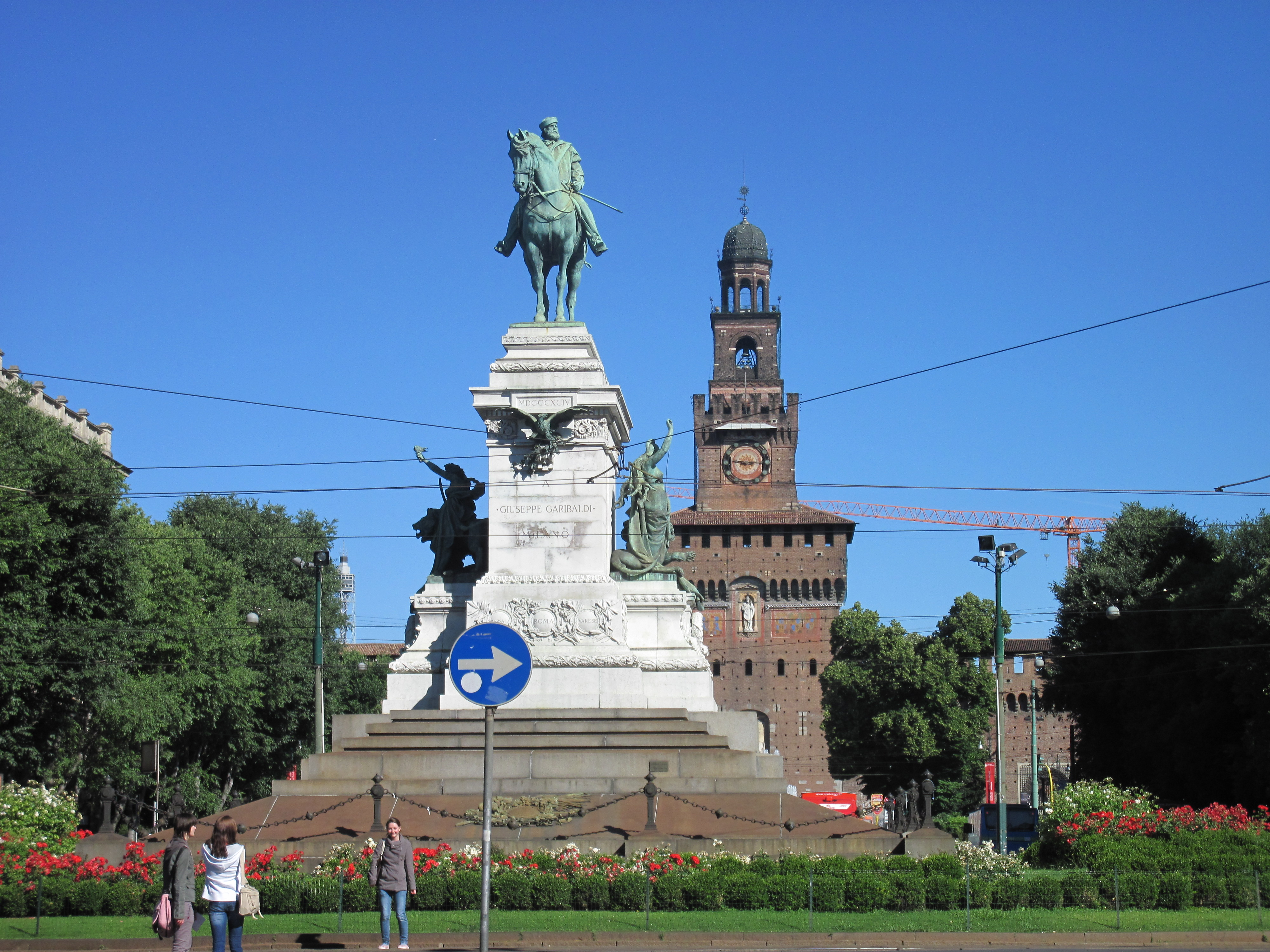 Милан. Джузеппе Гарибальди перед замком Сфорца